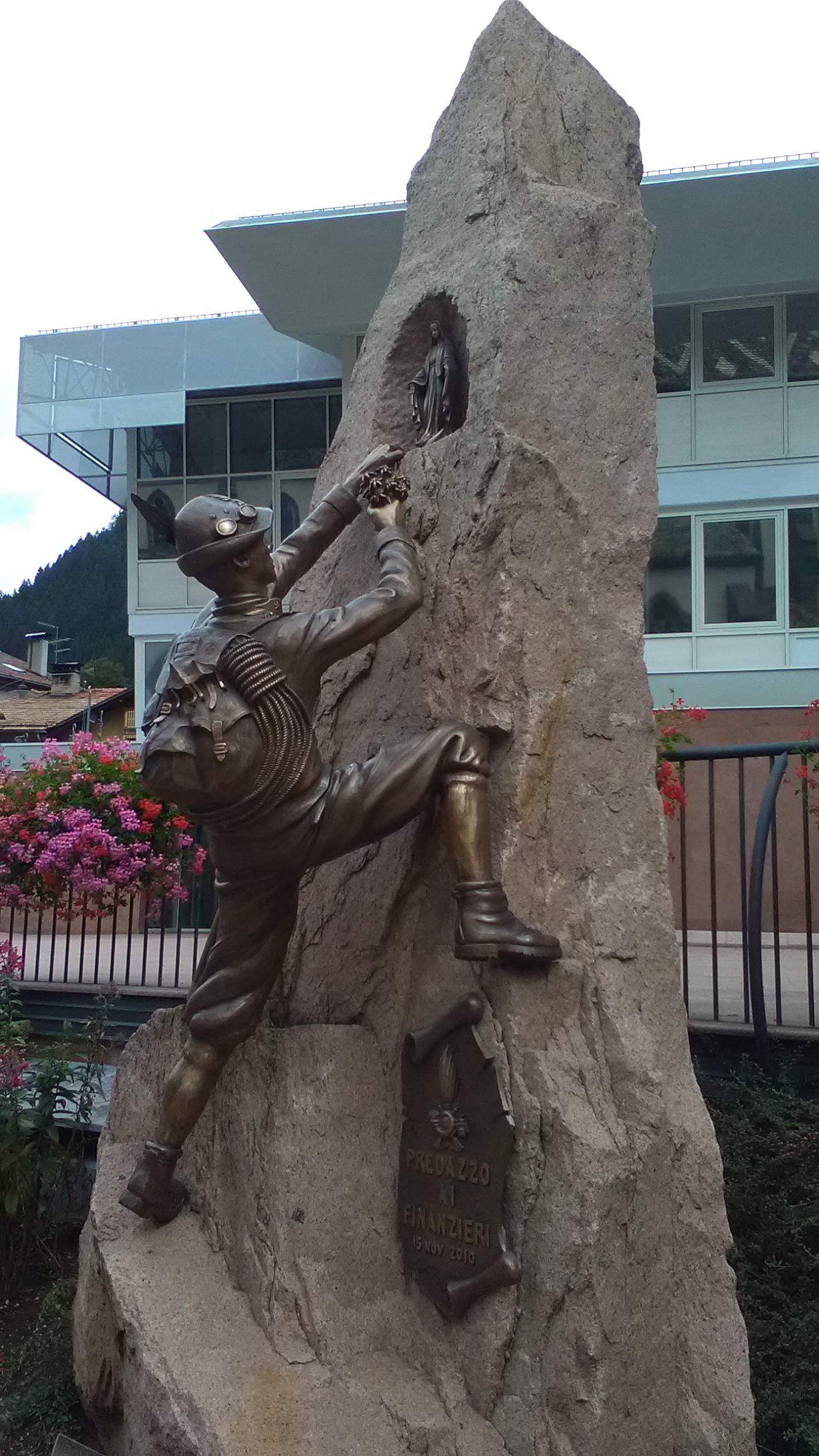 Scultura al finanziere di Predazzo